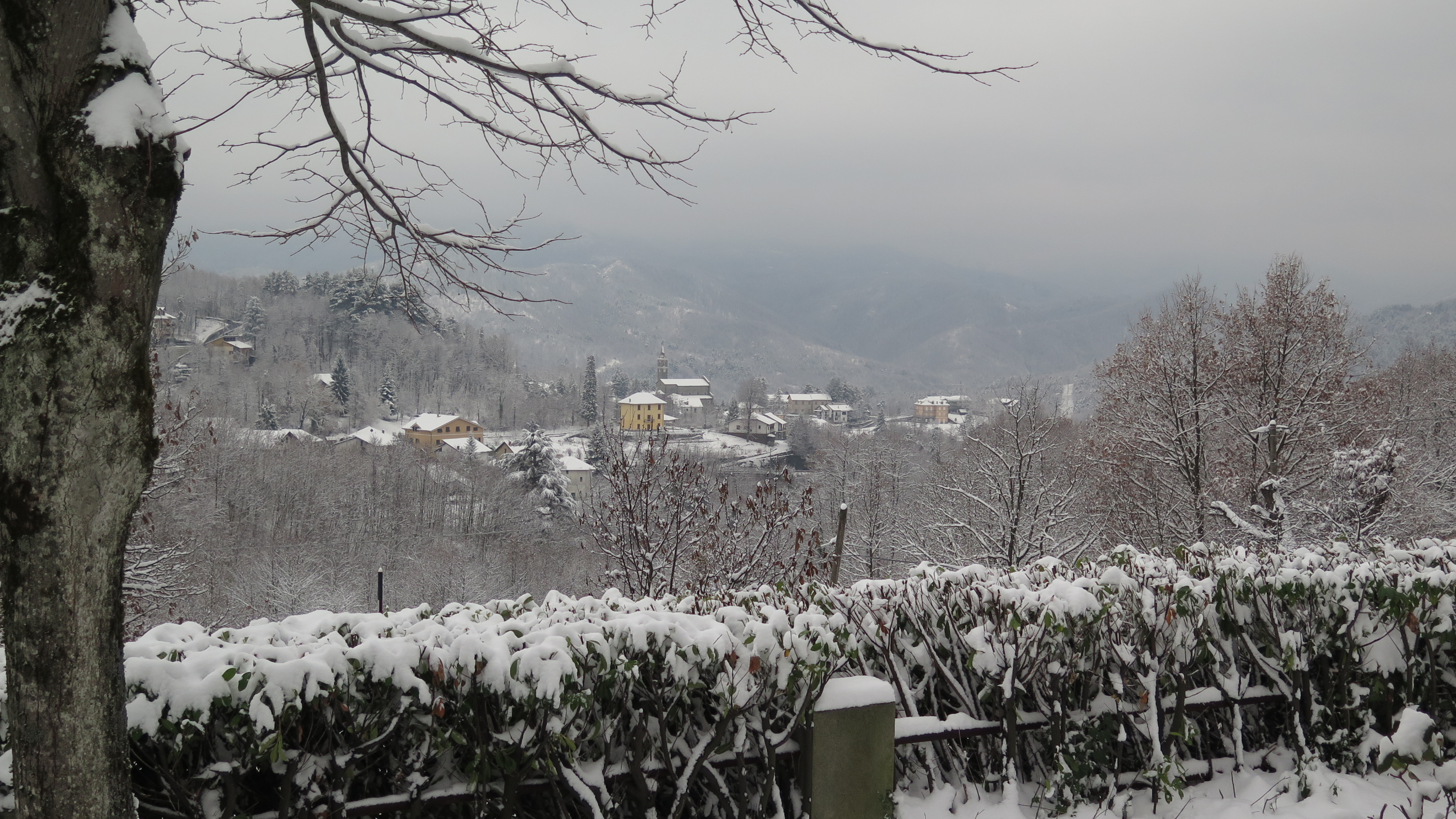 Una veduta del paese in inverno. Data la totale differenza del clima rispetto alle località costiere, durante i mesi più freddi è ancora possibile assistere ad intense nevicate.